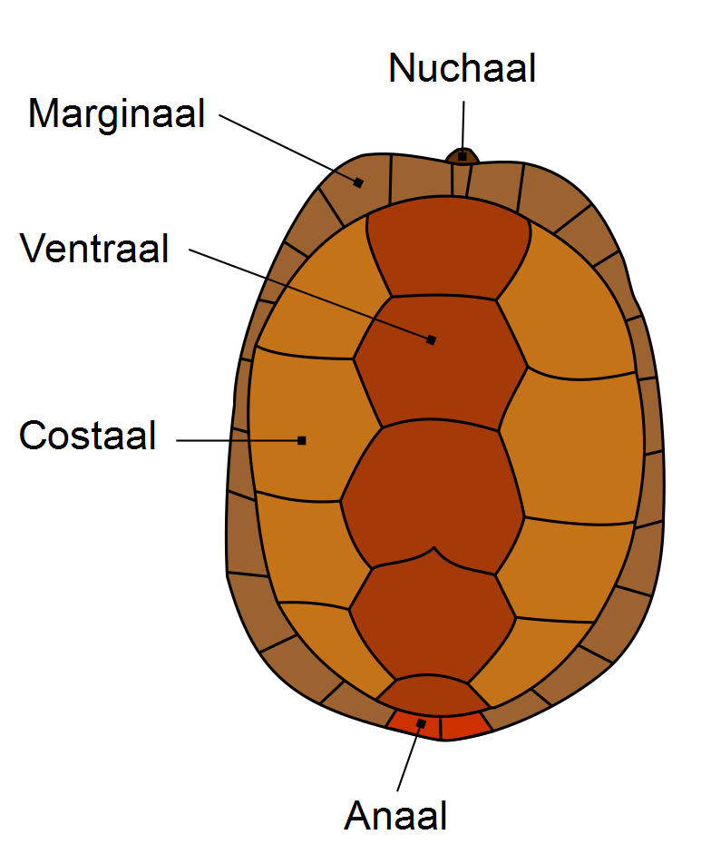 Carapax — Dutch version/Nederlandse versie